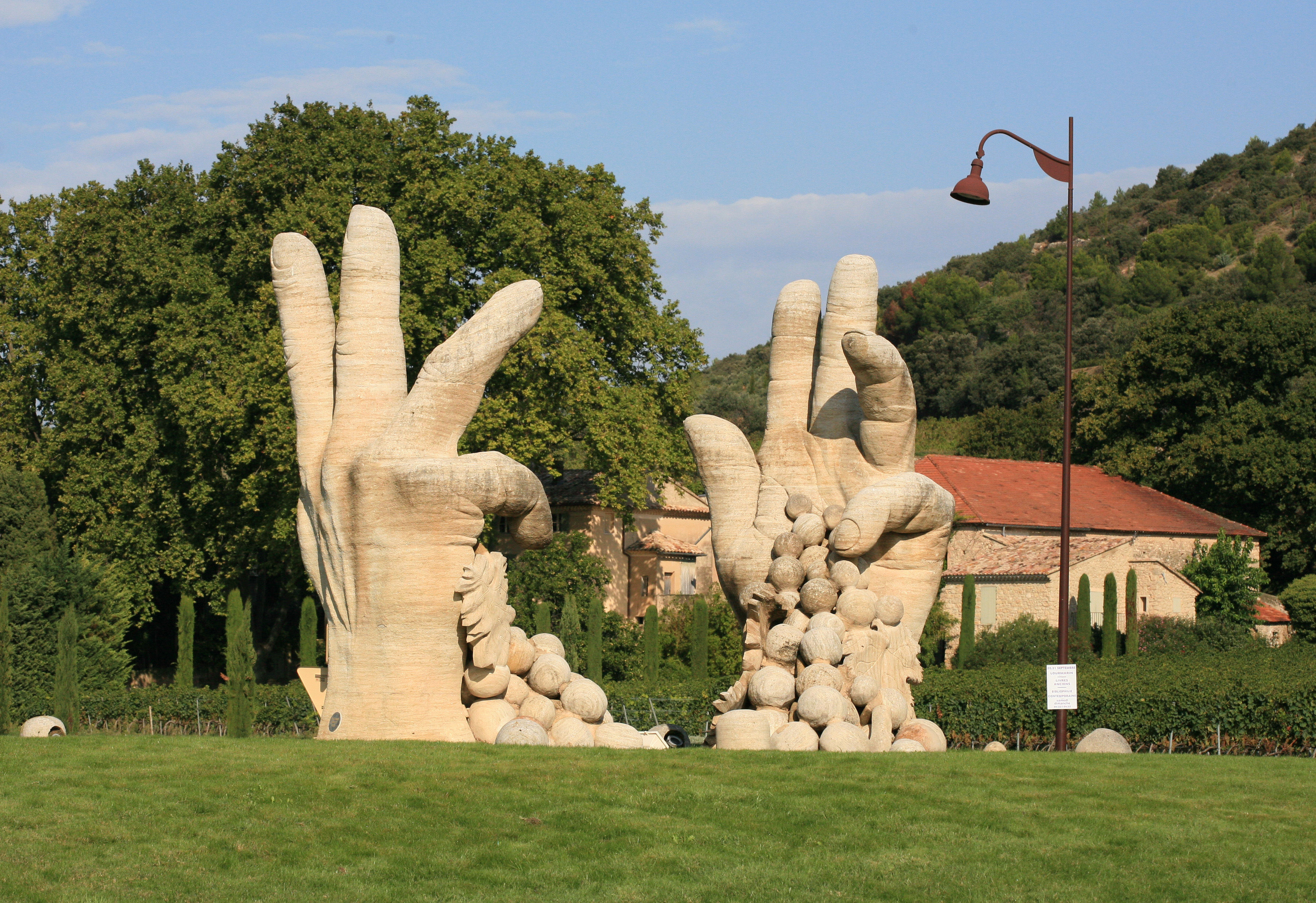 Sculpture mains du vigneron à Beames-de-Venise, Vaucluse, France